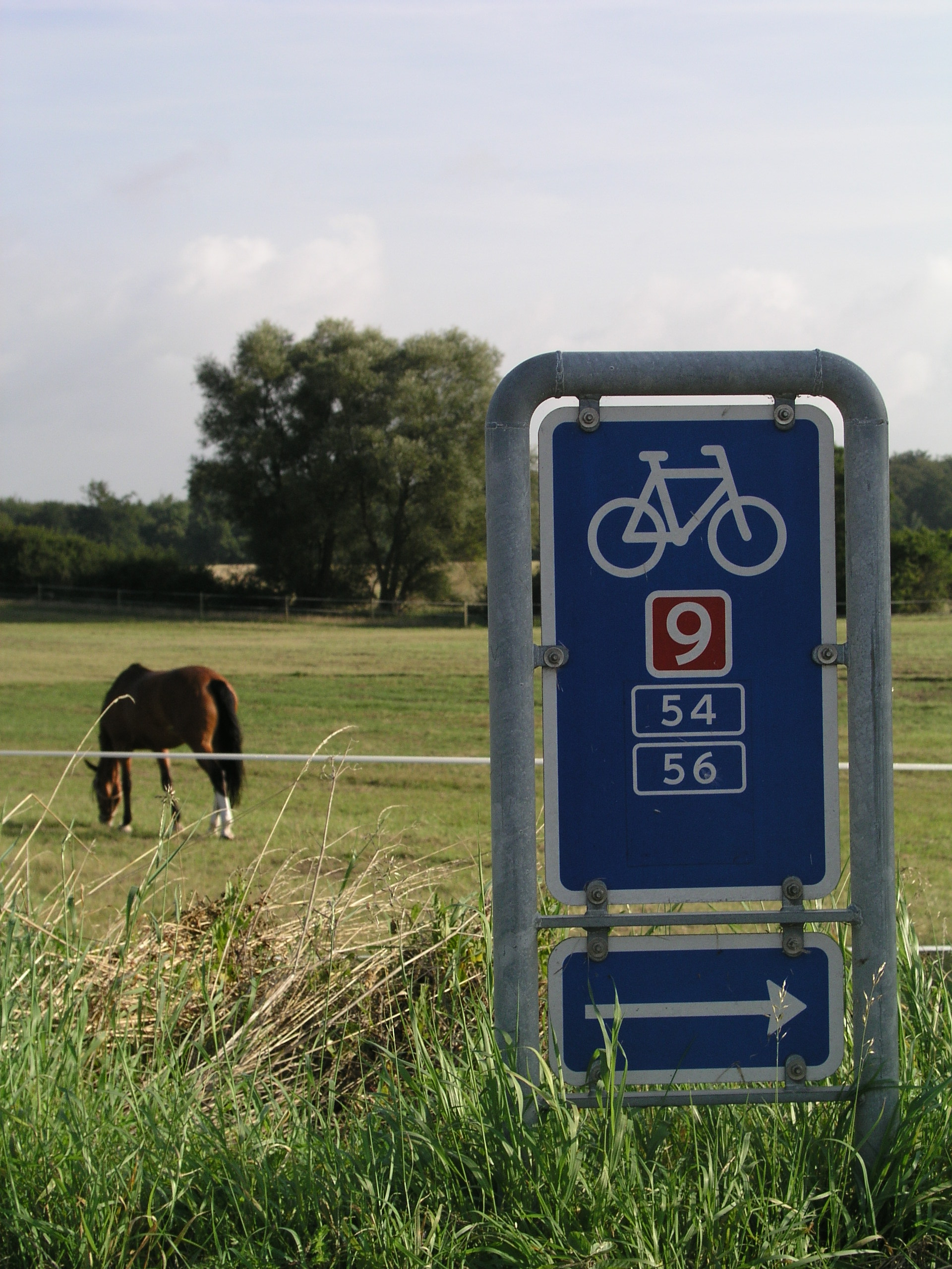 Ruteskilt ved den nationale cykelrute 9, der her løber sammen med regionalrute 54 og regionalrute 56